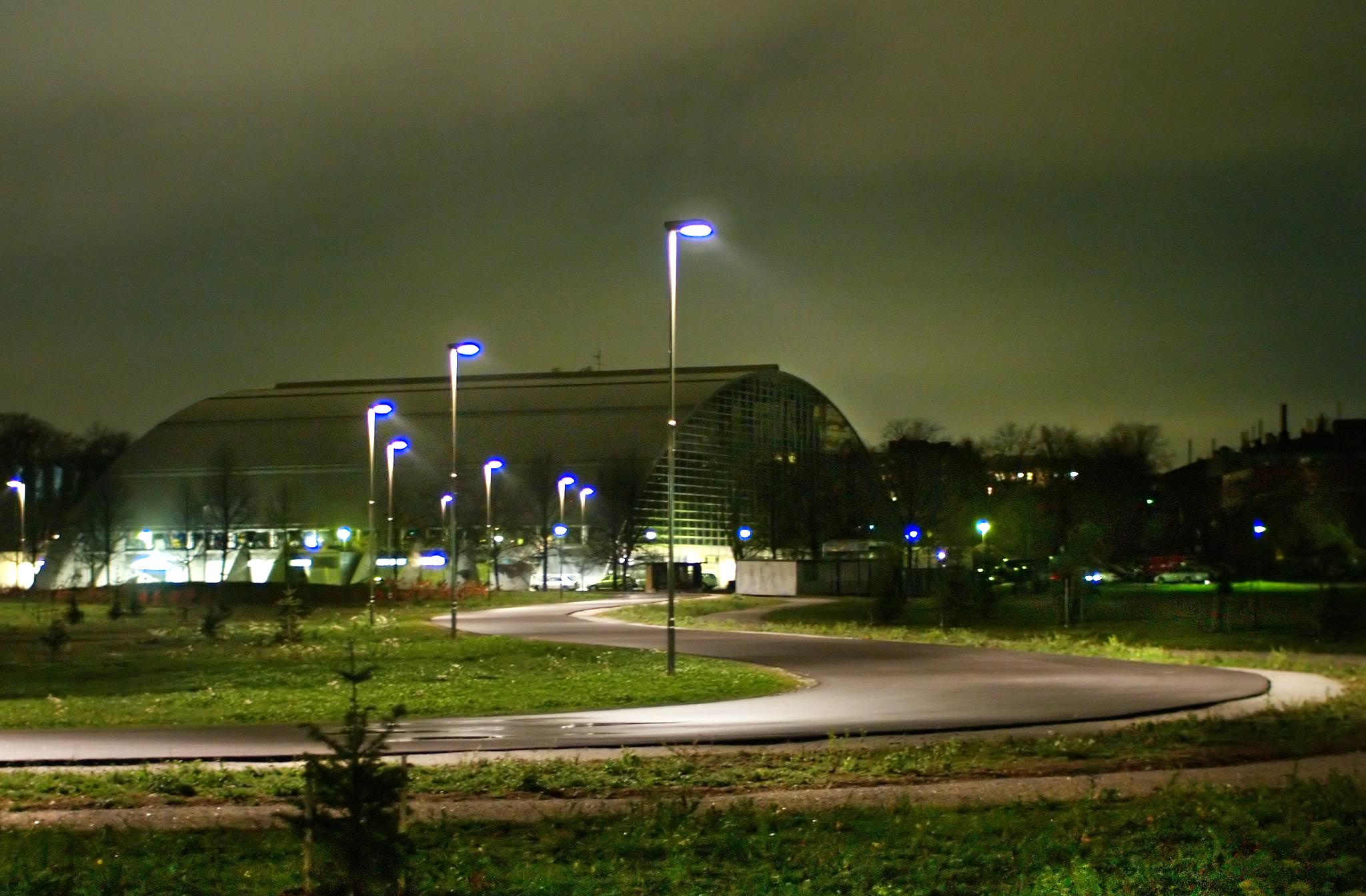 Kupittaan rullaluistelurata ja urheiluhalli.